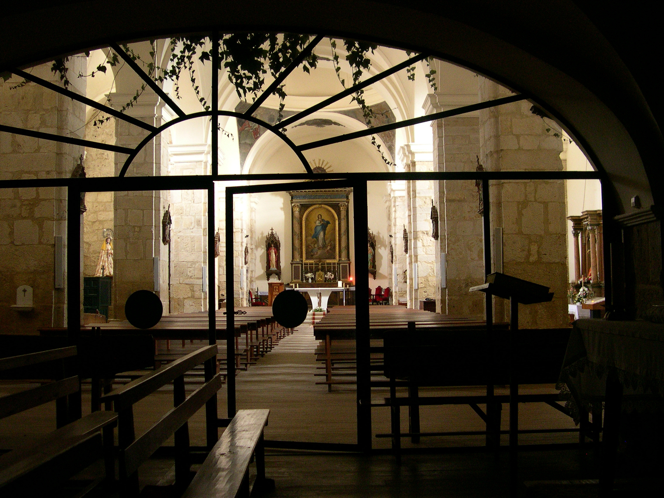 interior desde el soto coro de la iglesia de la Imnaculada Concepción, San Pedro de Latarce, Valladolid